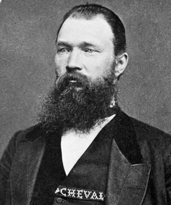 Guillaume Cheval, M.P., (Rouville)